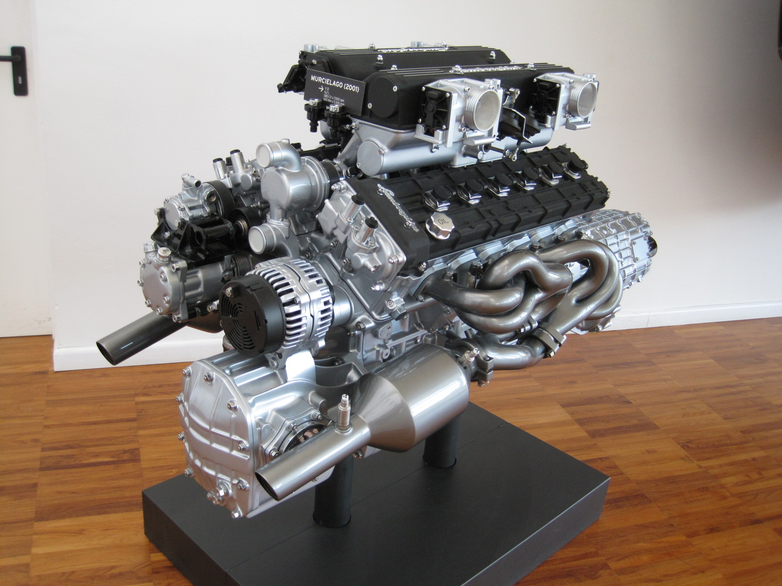 Musée Lamborghini - Moteur Murcielago V12 - 2001